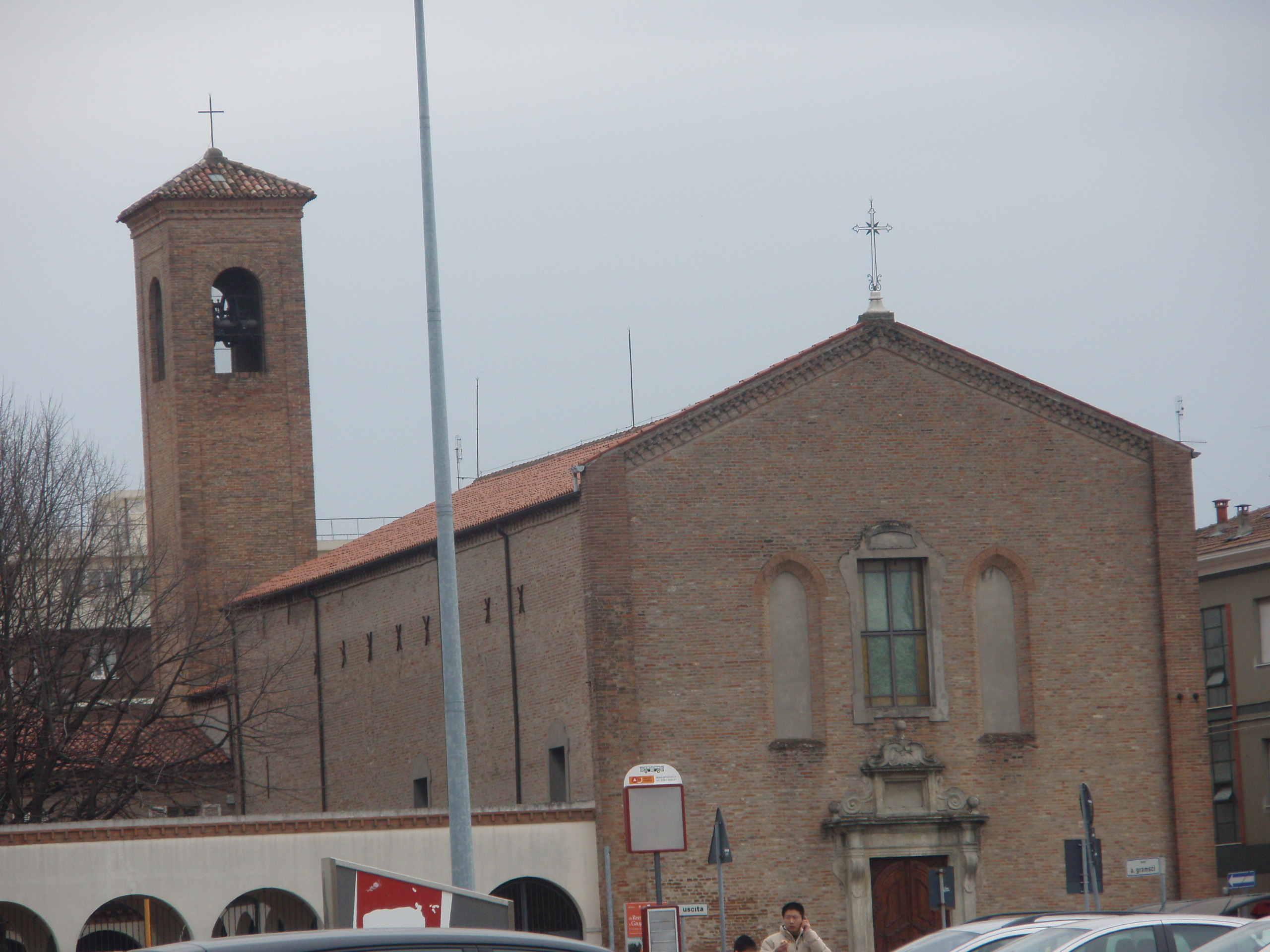 Chiesa dei Santi Bartolomeo e Marino (Santa Rita)